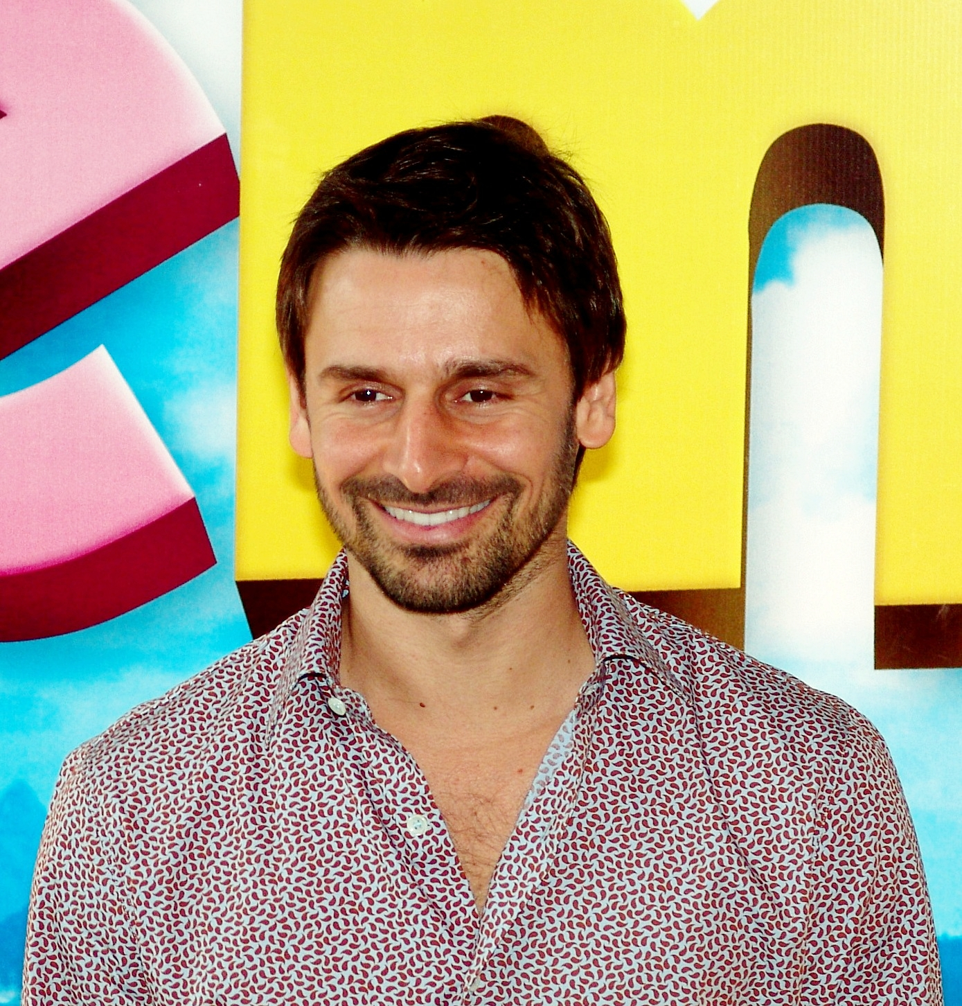 Murilo Rosa na estreia do filme "Xuxa Gemeas" em 2006.